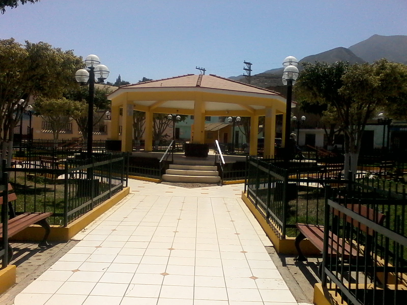 Vista de la plaza del Distrito de Calango. Provincia de Cañete, Lima, Perú.